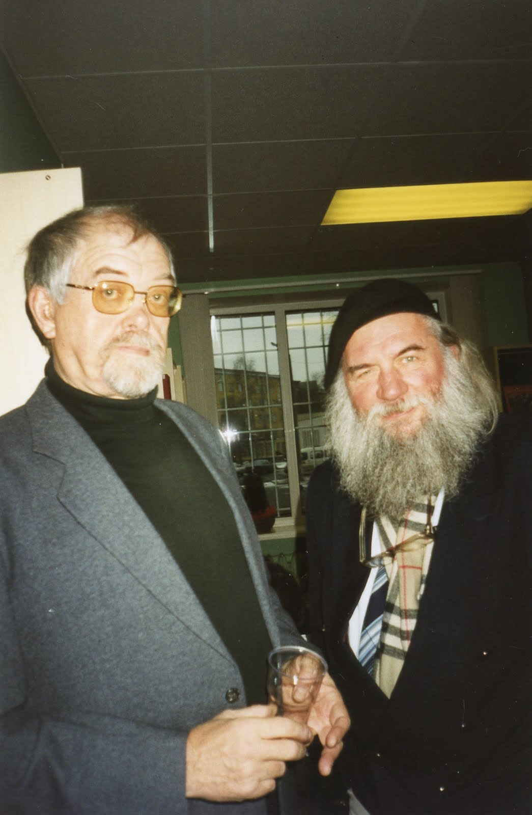 Henno Käo (vasakul) ja Ott Arder. 2002. aasta detsember, jõulupidu.